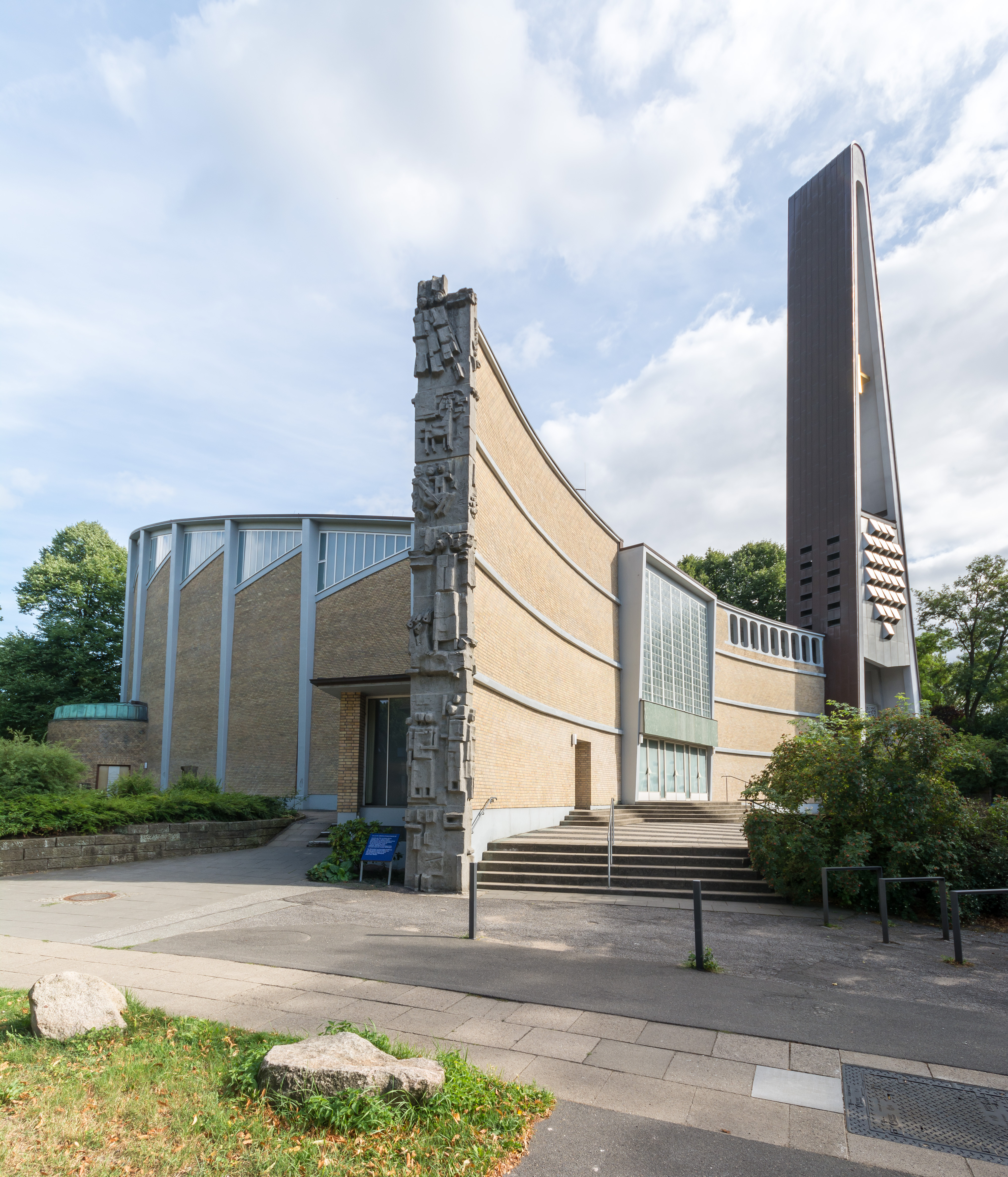 Ev.-luth. Dreifaltigkeitskirche in Hamburg-Hamm. This is a photograph of an architectural monument.